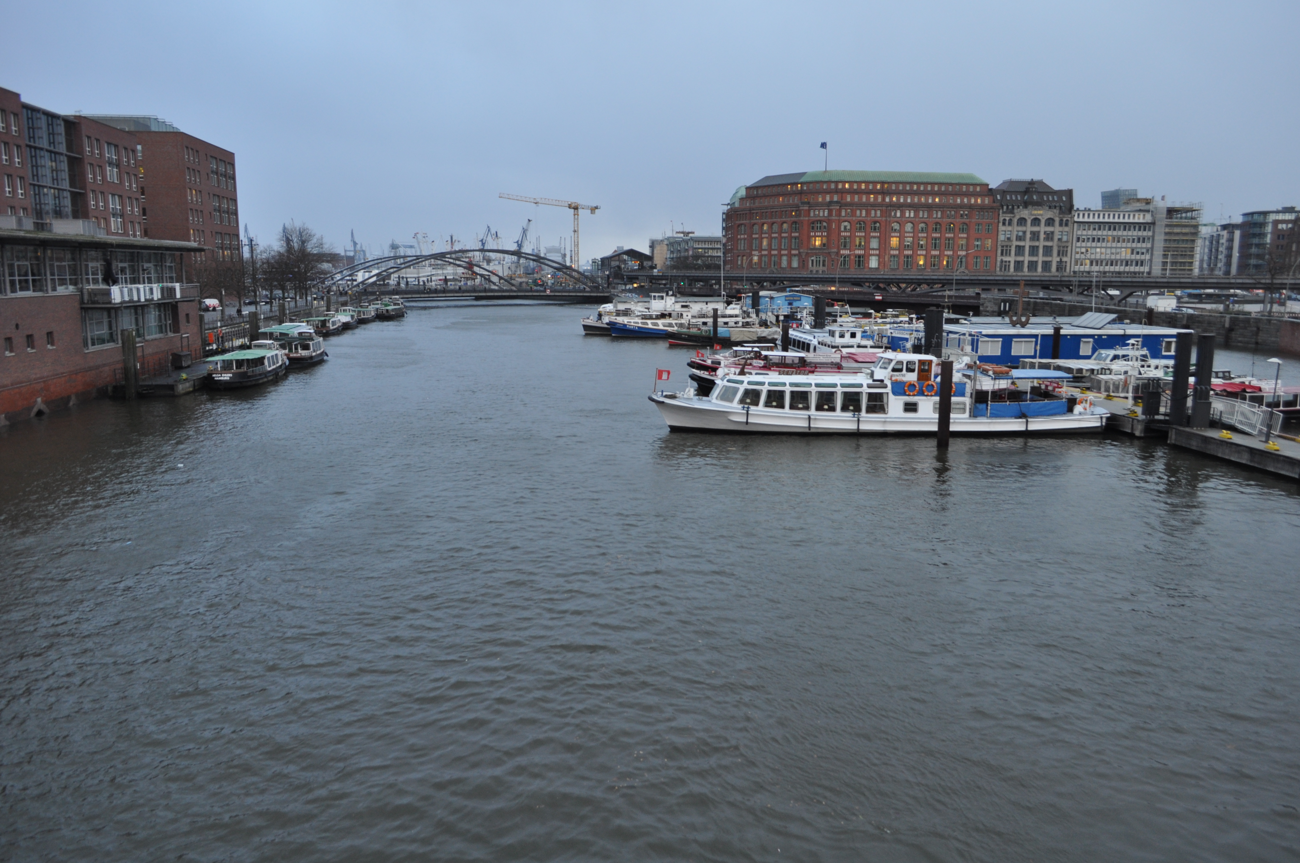 Binnenhafen in Hamburg etwa drei Stunden nach dem Morgenhochwasser am 06.12.2013, Wasserstand ca. 4 m über NN.